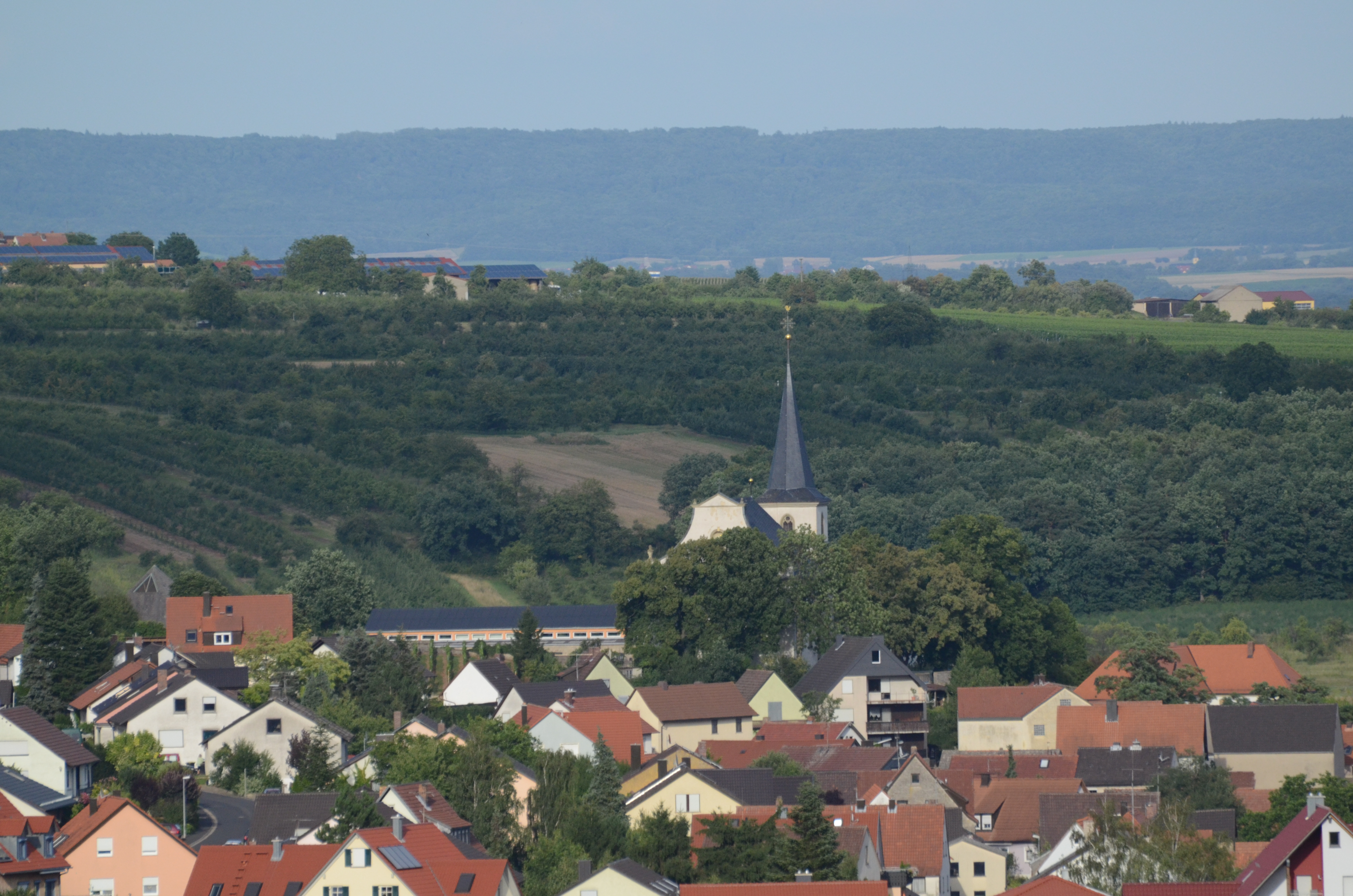 Wipfeld mit der kath. Kirch St. Johannes der Täufer